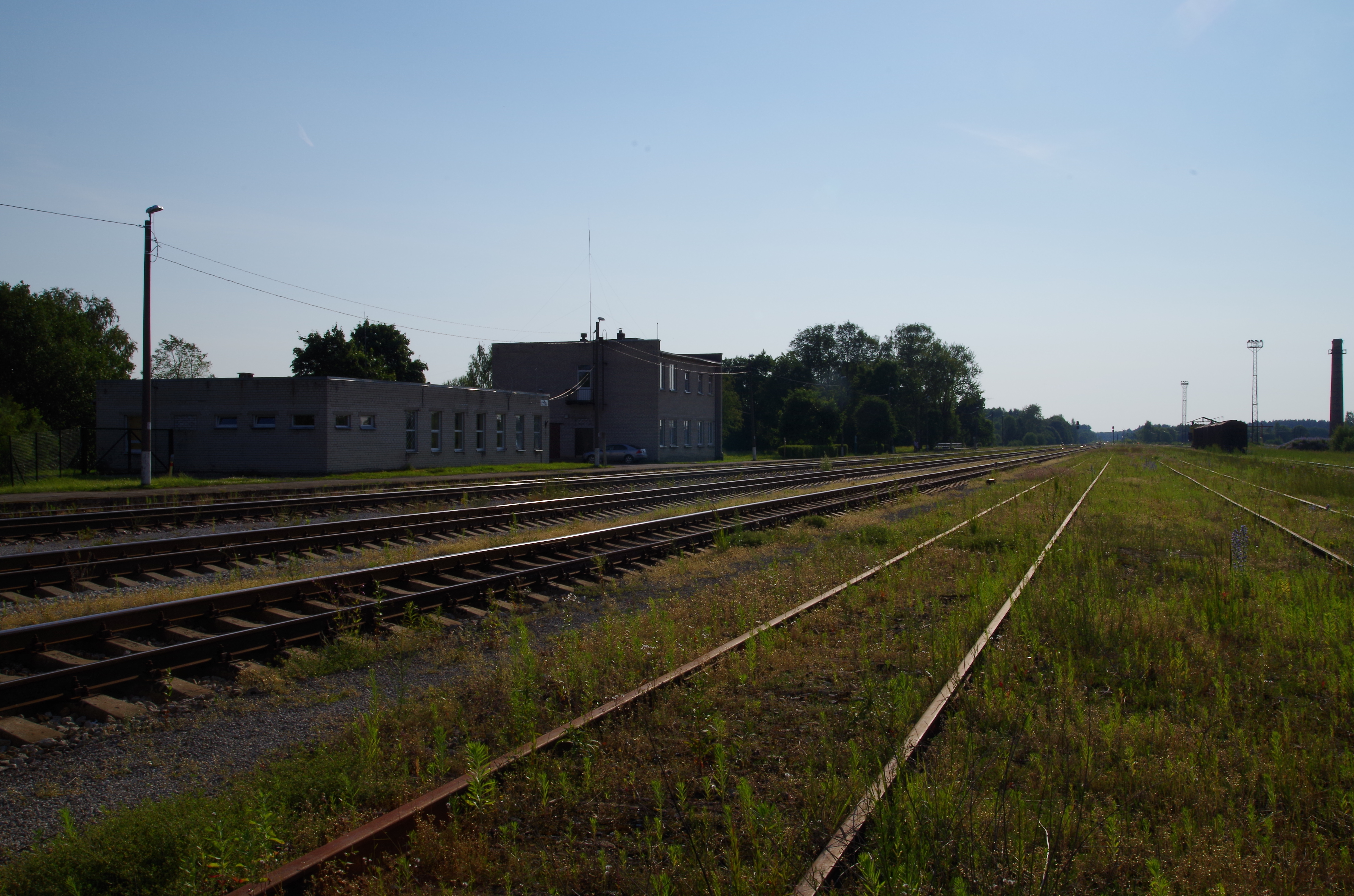 Kohtla raudteejaam